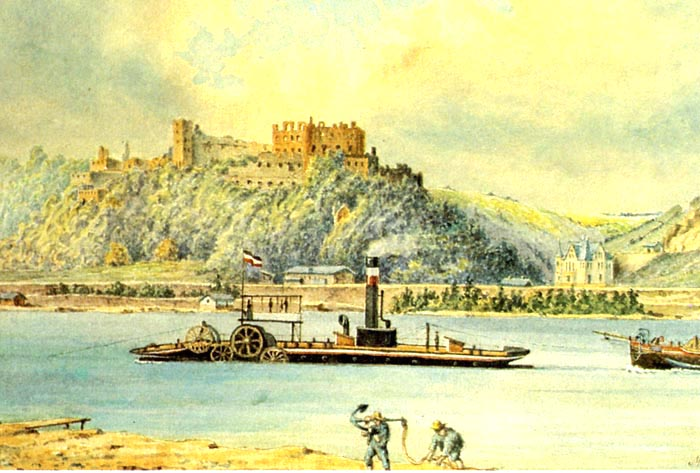 Seilschiff in Koblenz zu Tal